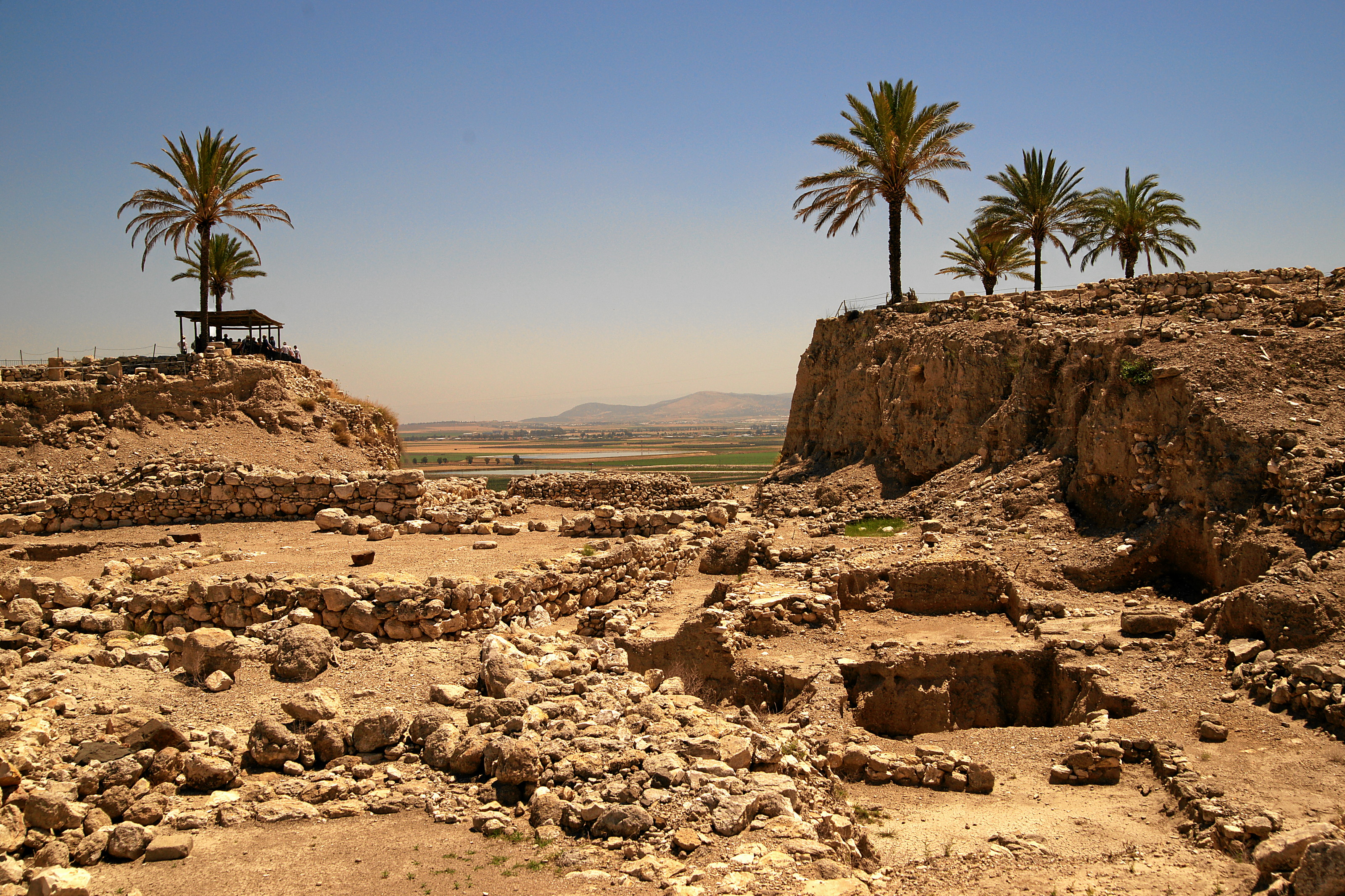 Tel Megiddo: Heiliger Bezirk (Sacred Area)